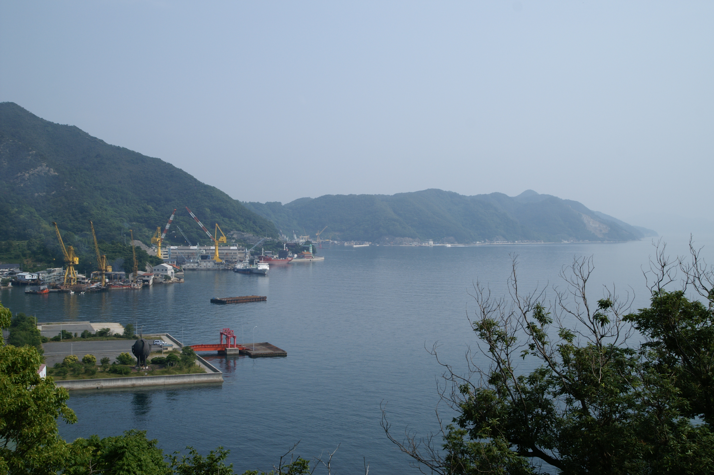 Kinoe, Osaki-Kamijima seen from south (Osaki-Kamijima, Hiroshima, JAPAN)